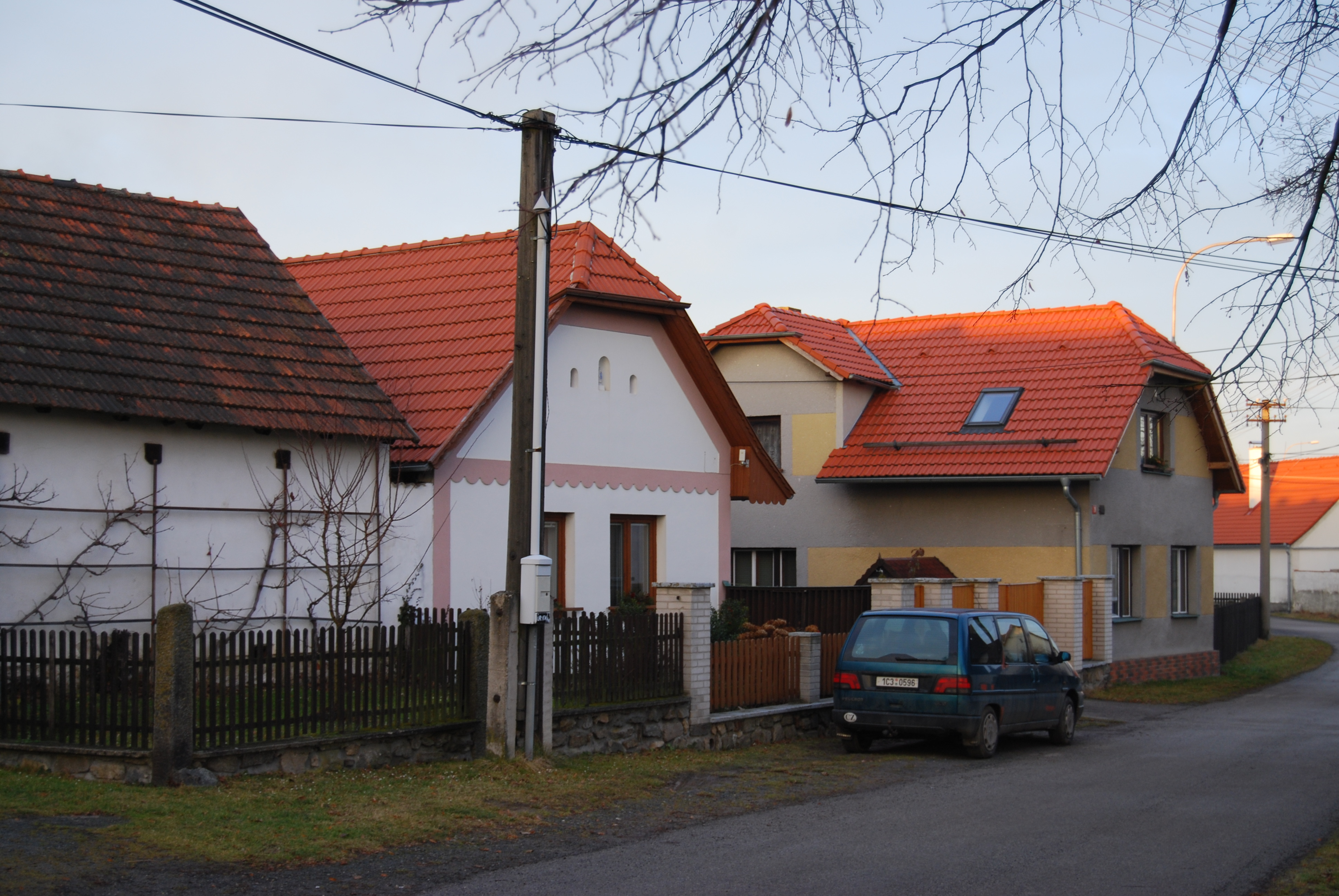 Pohled na část obce. Obec Radkov - v okrese Tábor, kraj Jihočeský. Česká republika.